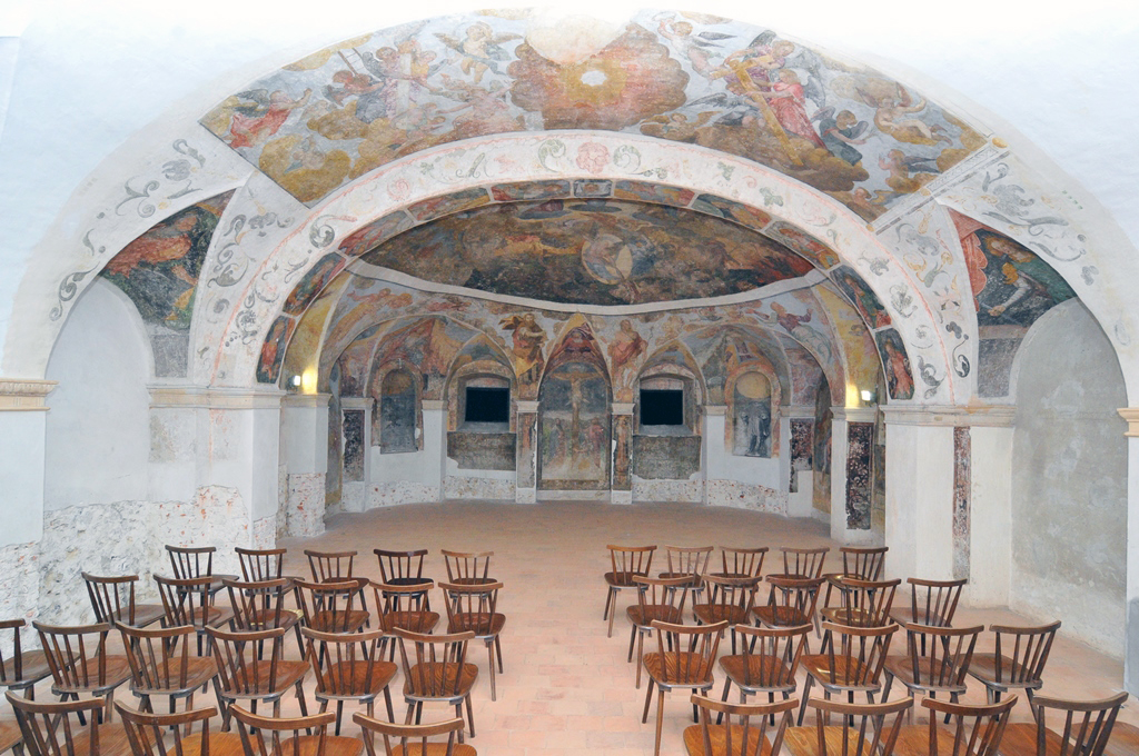 Freske v Lutrovski kleti